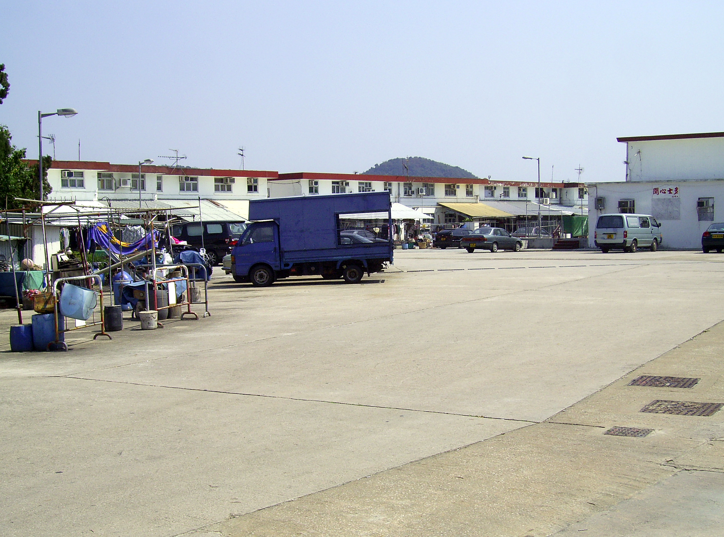 中文（香港）: 三門仔聯益漁村